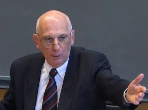 Michel Zink au Collège de France en avril 2009.